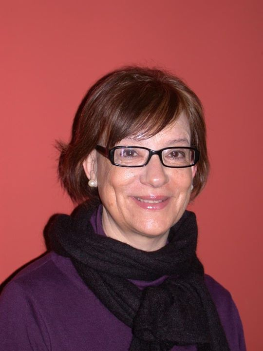 Gisela Pou Valls és una escriptora castellarenca.